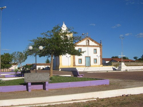 igreja do rosario